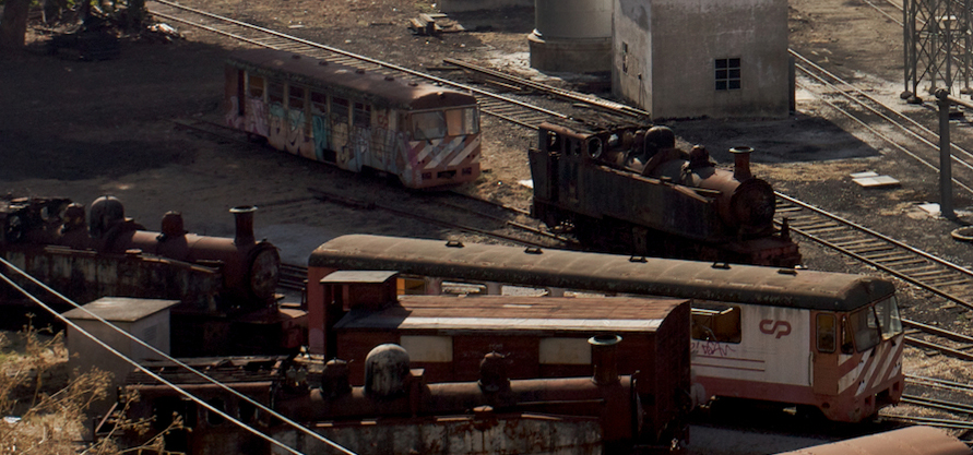 Tipo: E [Estação] Local: Peso da Régua Linha do Douro, PK 103 • Linha do Corgo, PK 0,0] Data e hora: 2 de Outubro de 2010 [10h20]